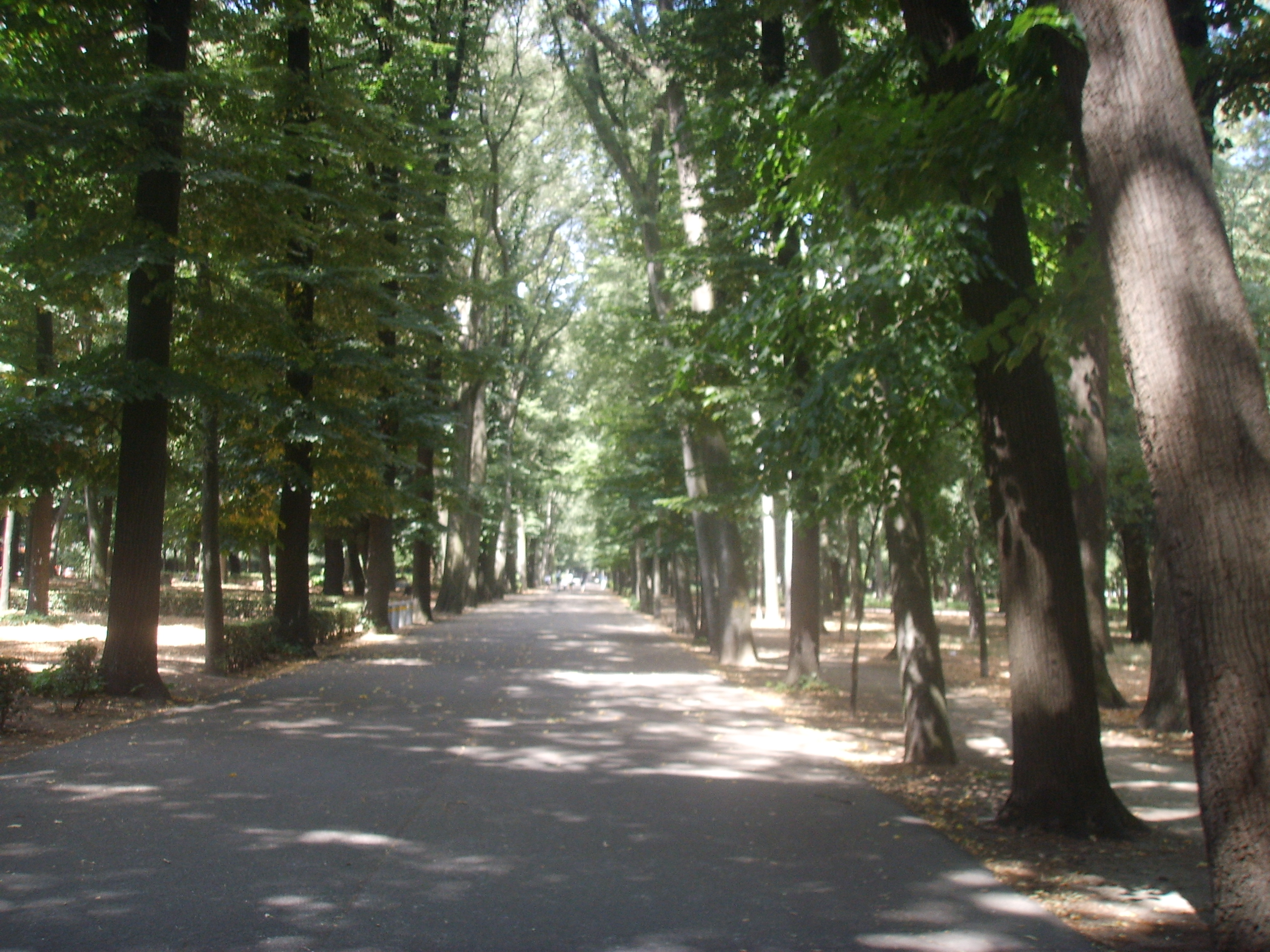 Parco delle Cascine in Florence